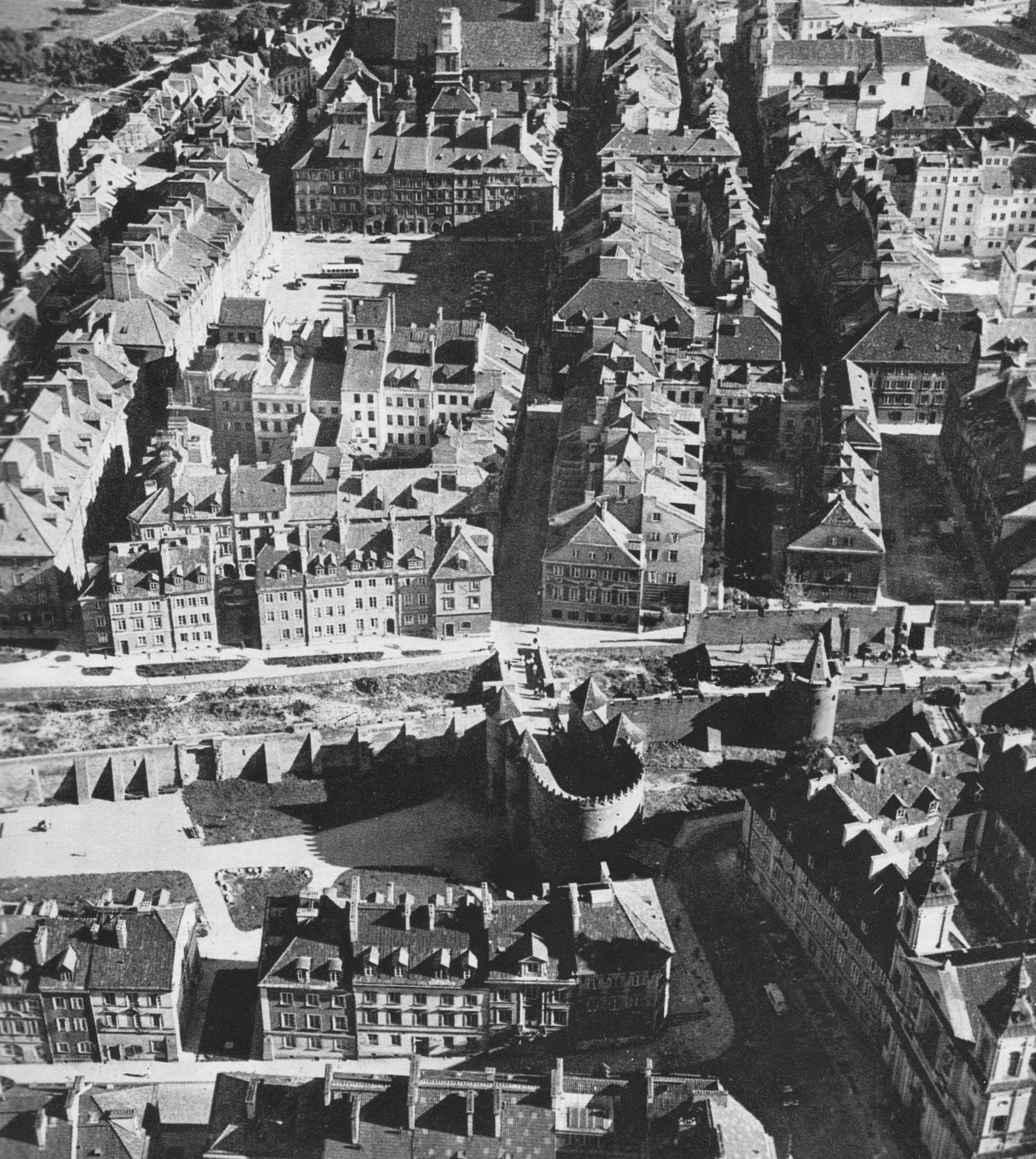 Stare Miasto w Warszawie z lotu ptaka